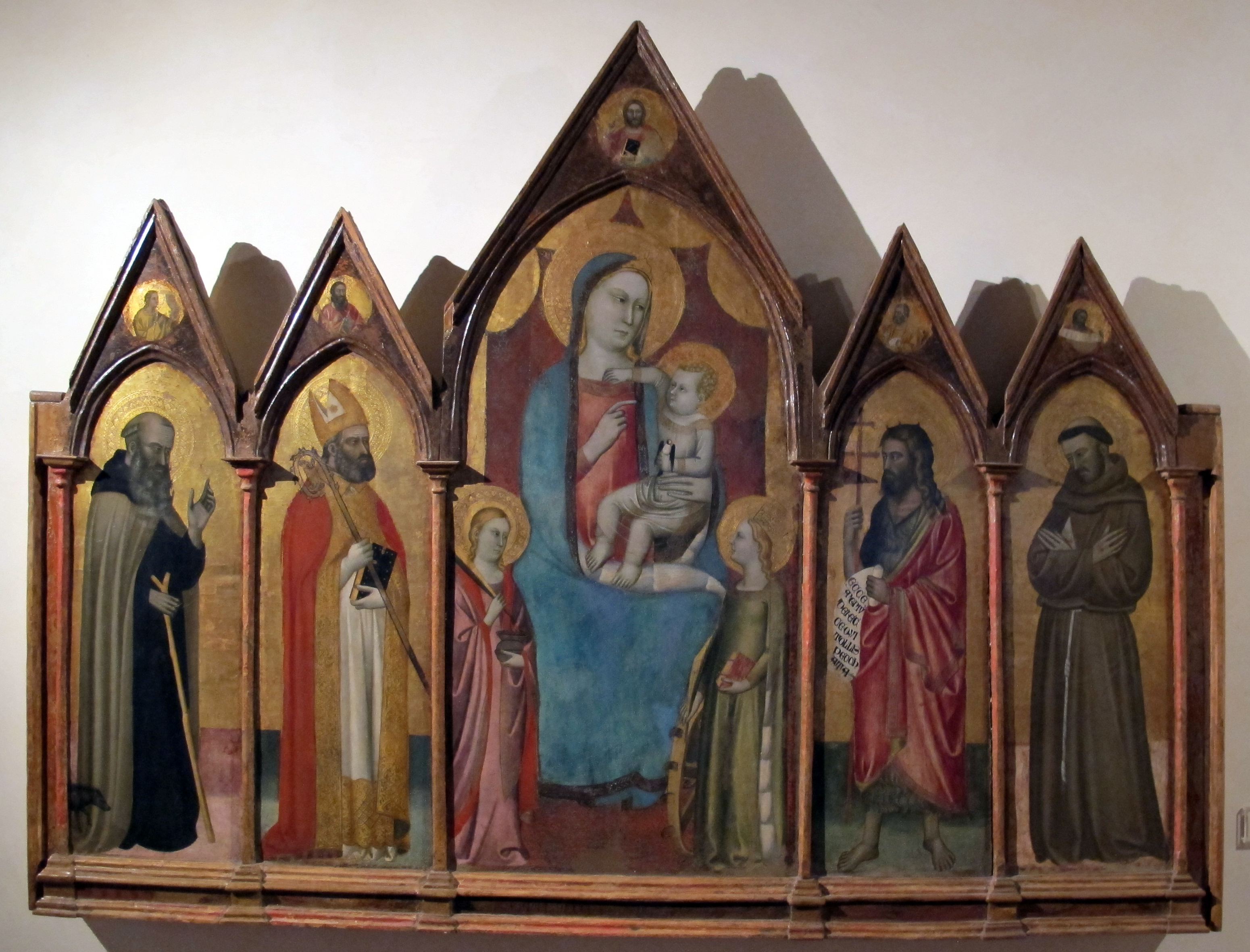 Puccio di simone, madonna col bambino e santi, 1357 ca. (da s. pietro a petrognano)